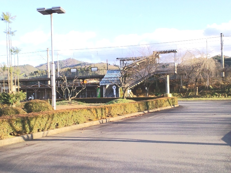 公庄駅（遠景）